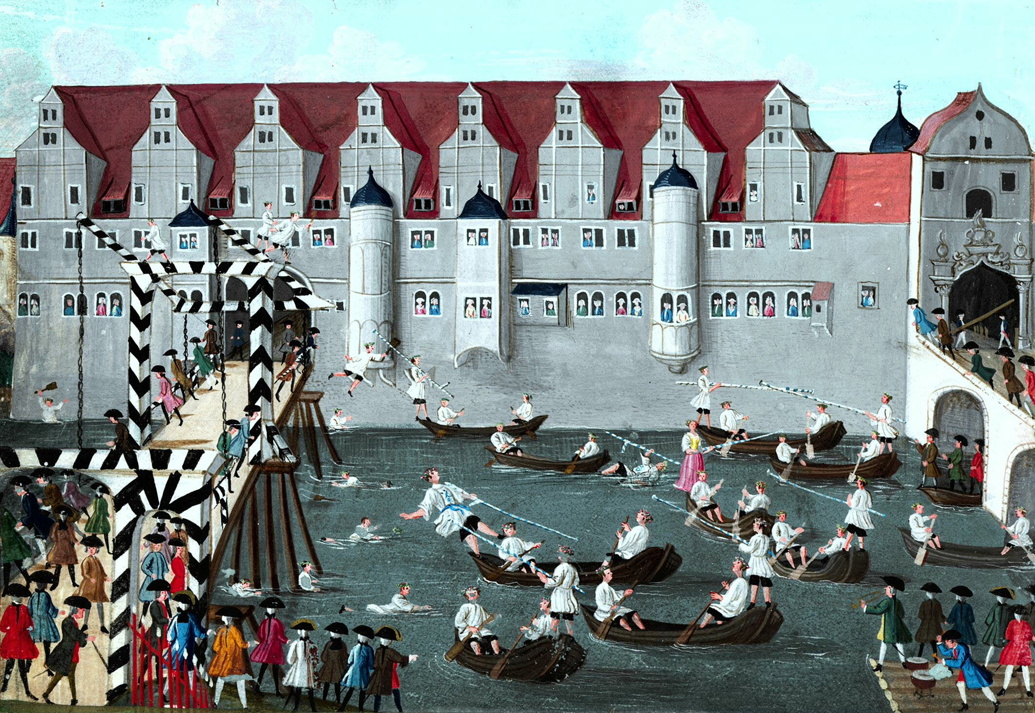 Das Fischerstechen auf der Saale: eine Art Turnier, "das die Halloren vor allem bei Besuchen des regierenden Landesherren" aufführeten "um ihn und seine Gäste zu unterhalten. Austragungsort die Saale vor der Residenz." (Piechocki)